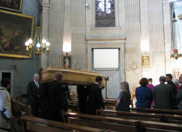 Władysław Żeleński's funeral